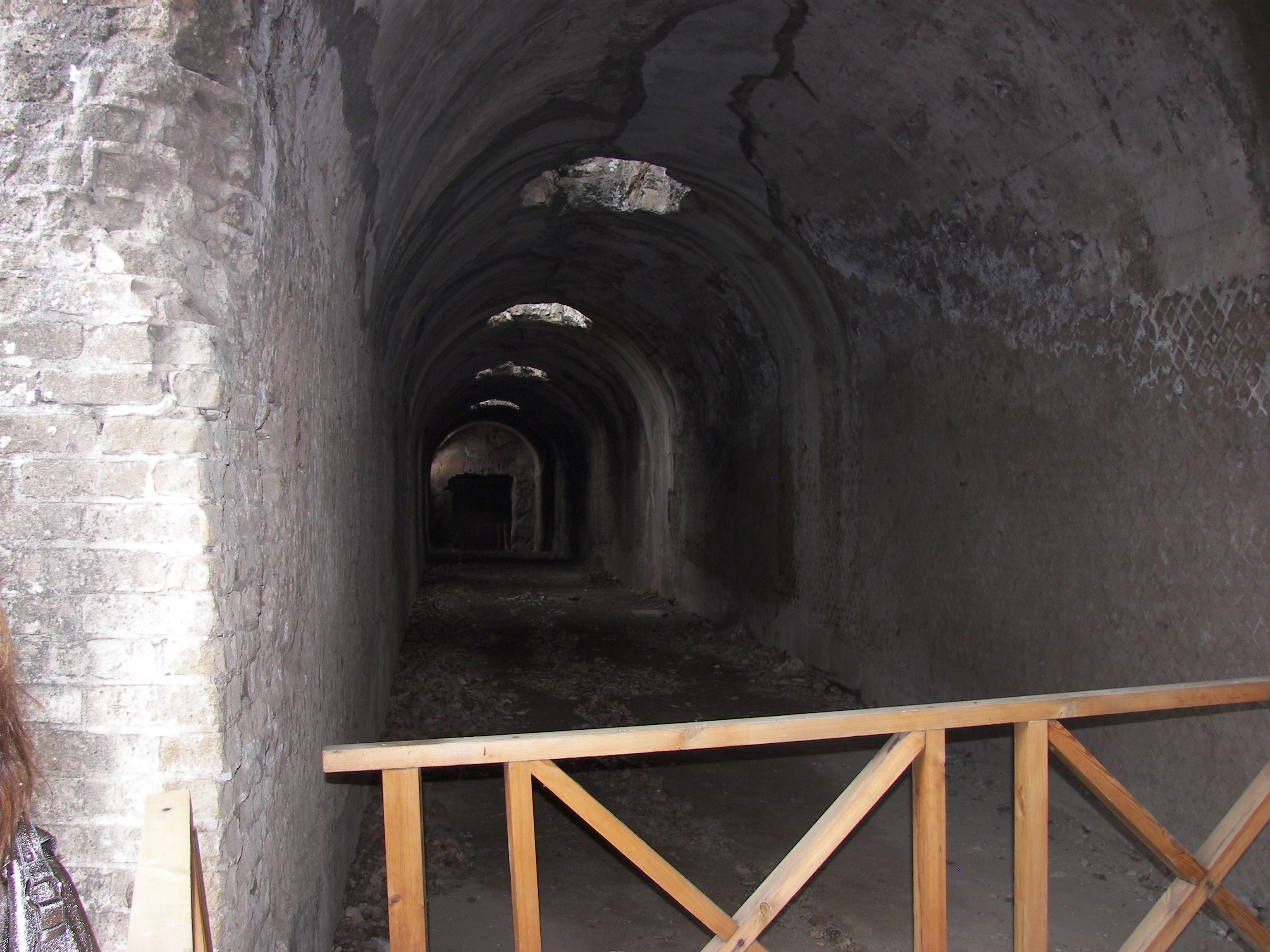 Tunnel near the Pretorio in Villa Adriana, Tivoli.